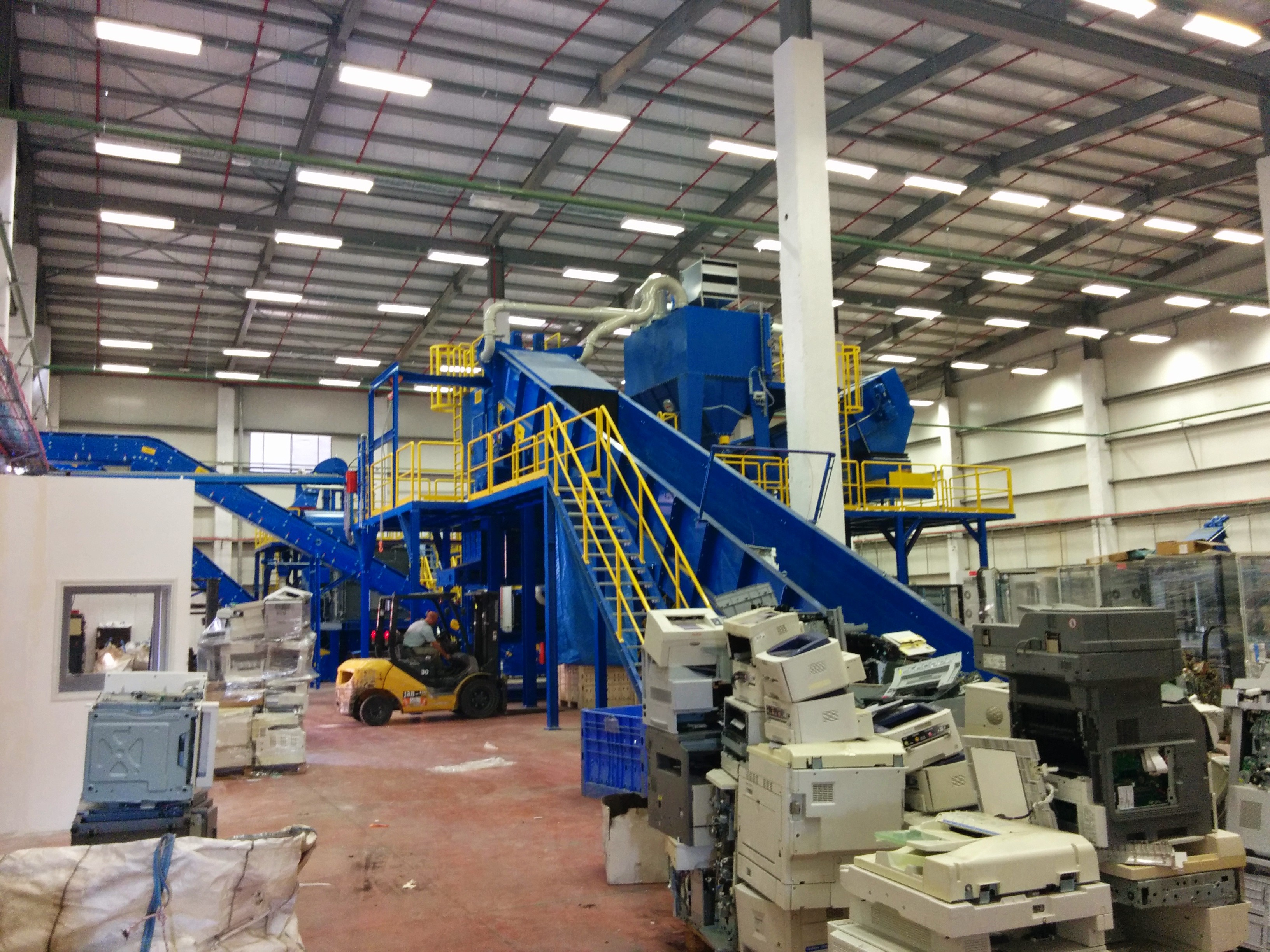 מפעל מיחזור פסולת אלקטרונית בשומרון - אולטרייד בברקן